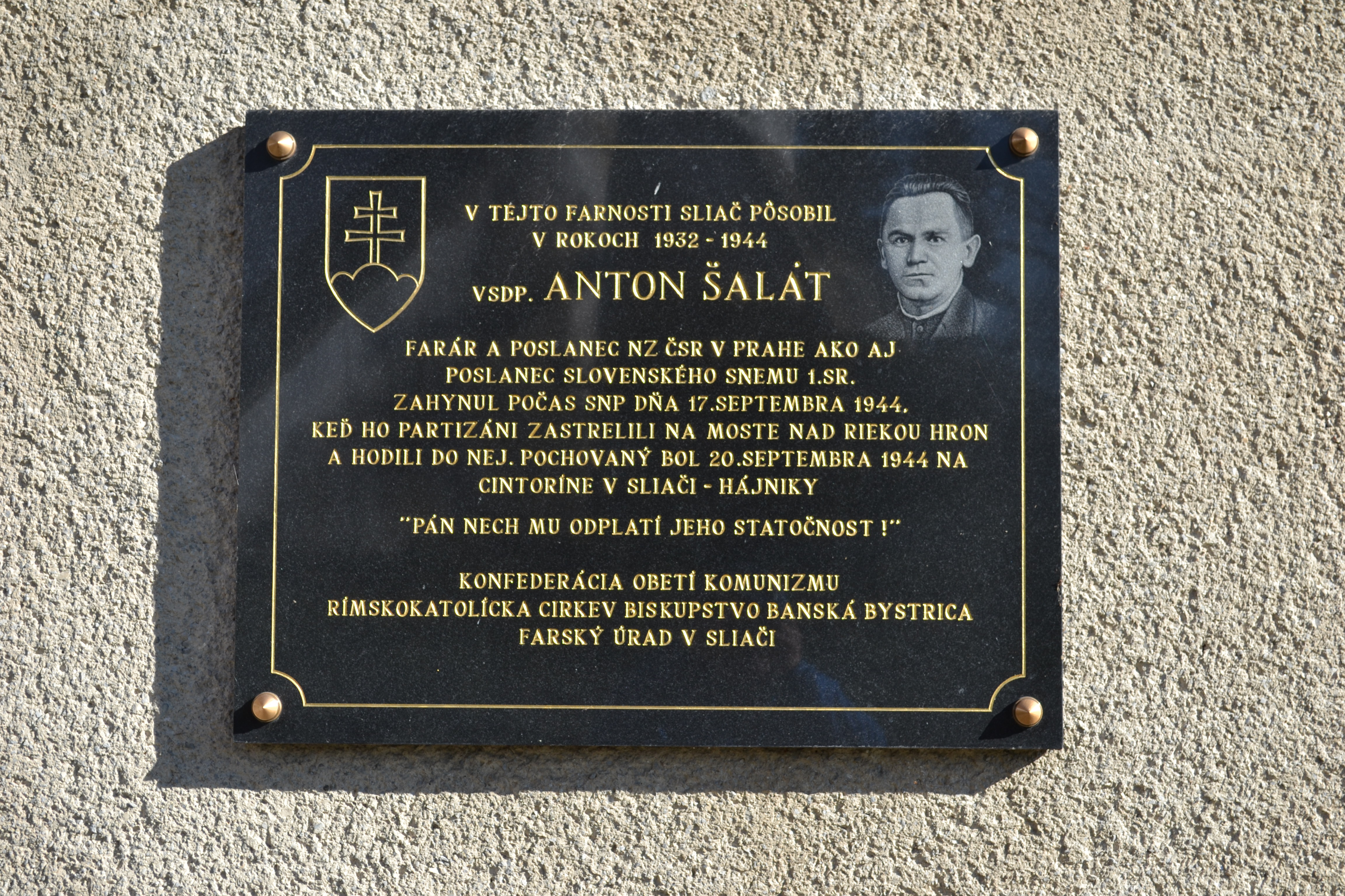 Pamätná tabuľa Antona Šaláta v Sliači.